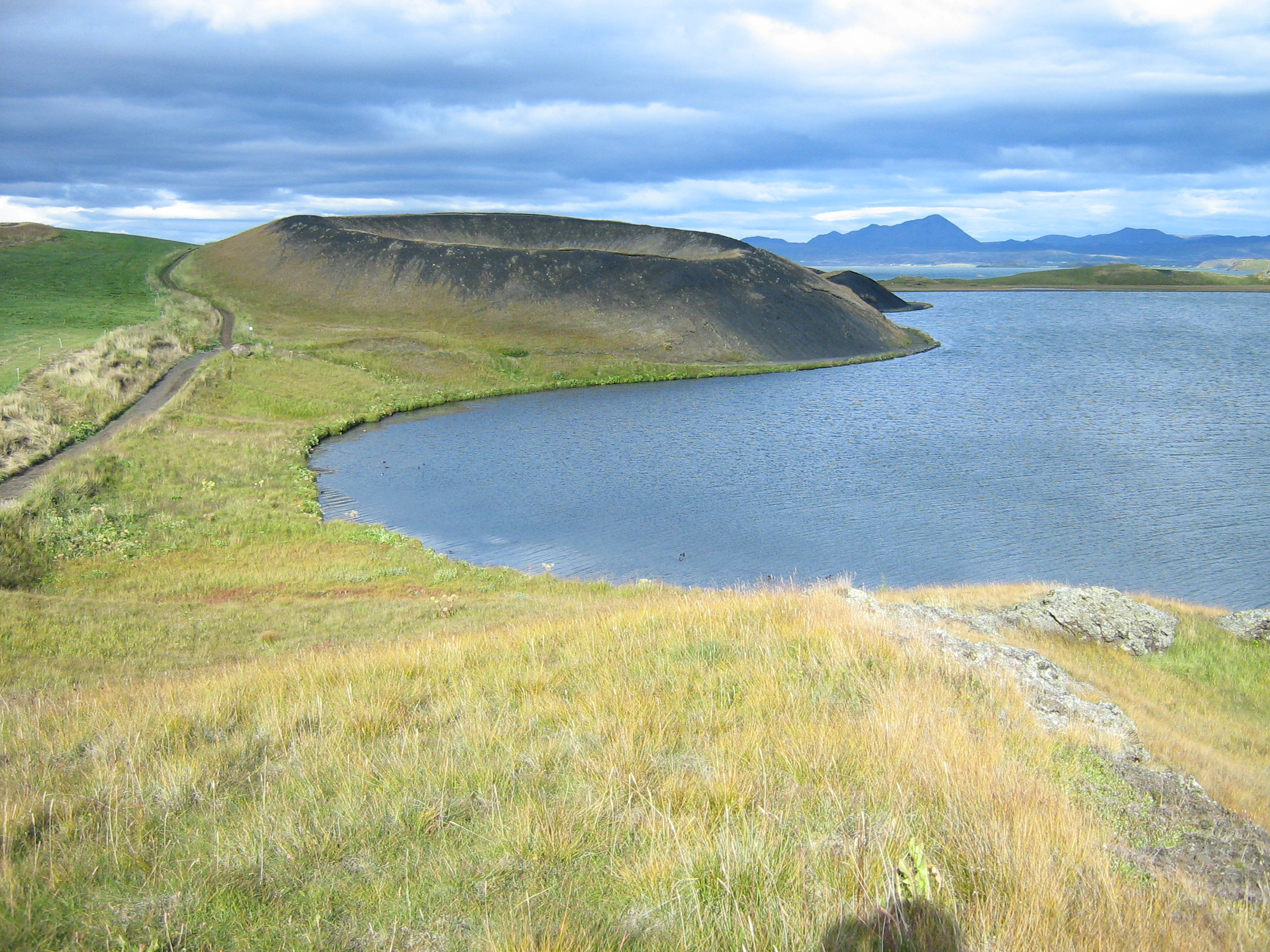 Island Myvatn Pseudokrater